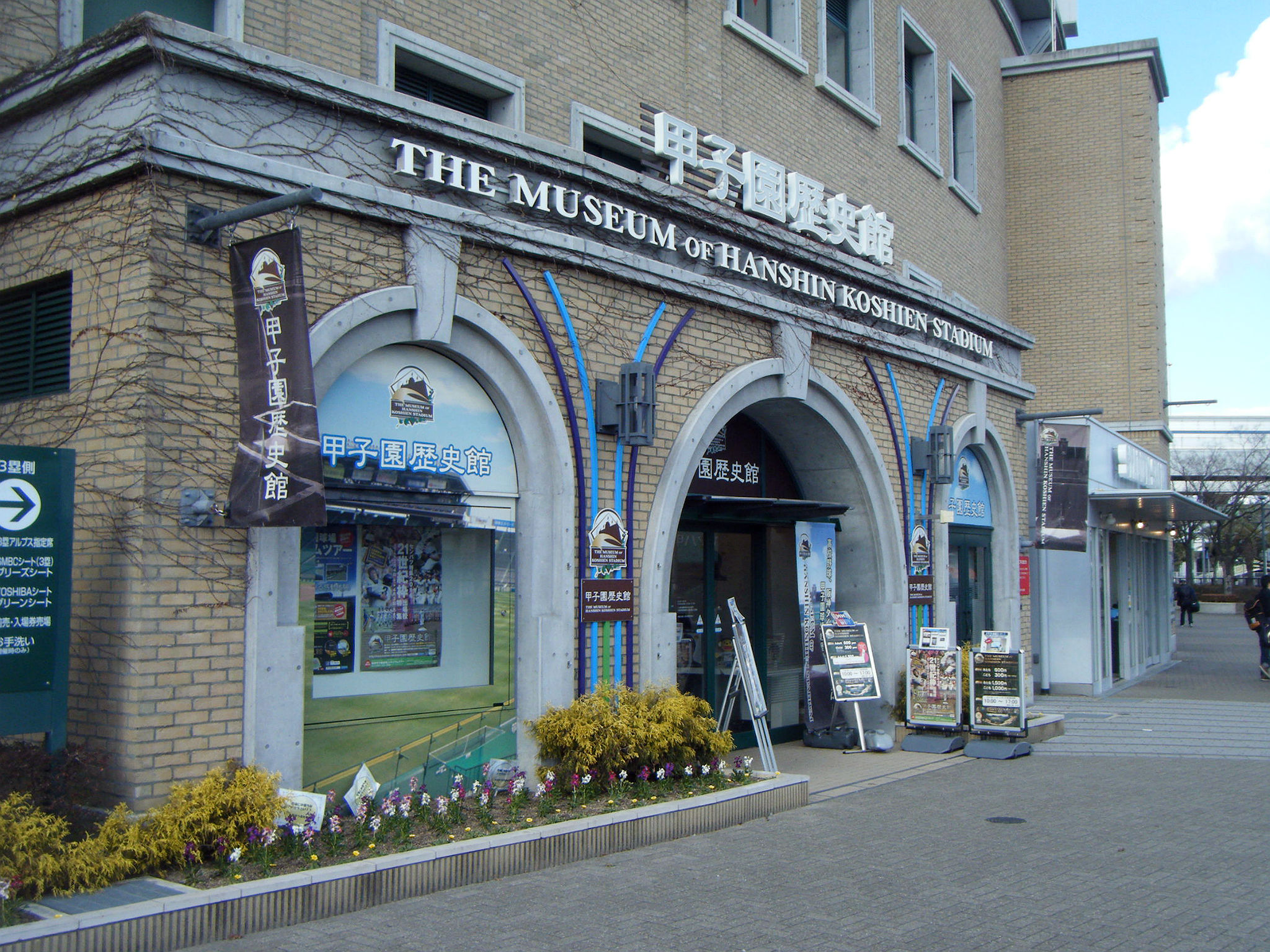 阪神甲子園球場 甲子園歴史館